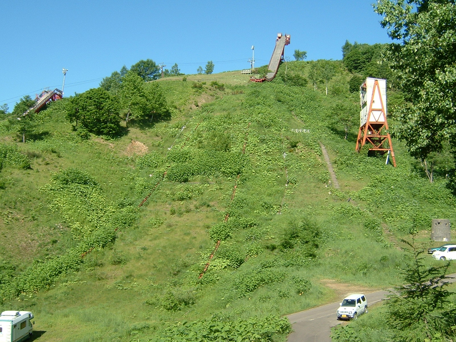 倶知安・旭丘シャンツェ Kucchan-Asahigaoka-Schanze スキージャンプ競技場